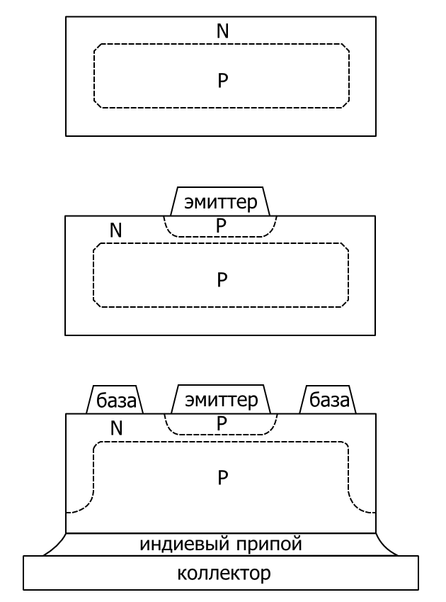 Первая исторически технология диффузионного (из газовой среды) транзистора - меза-транзистор Шокли. Это первый вариант меза-технологии из отдельных таблеток (годом позже пошла меза-технология с травлением мез на общей пластине).